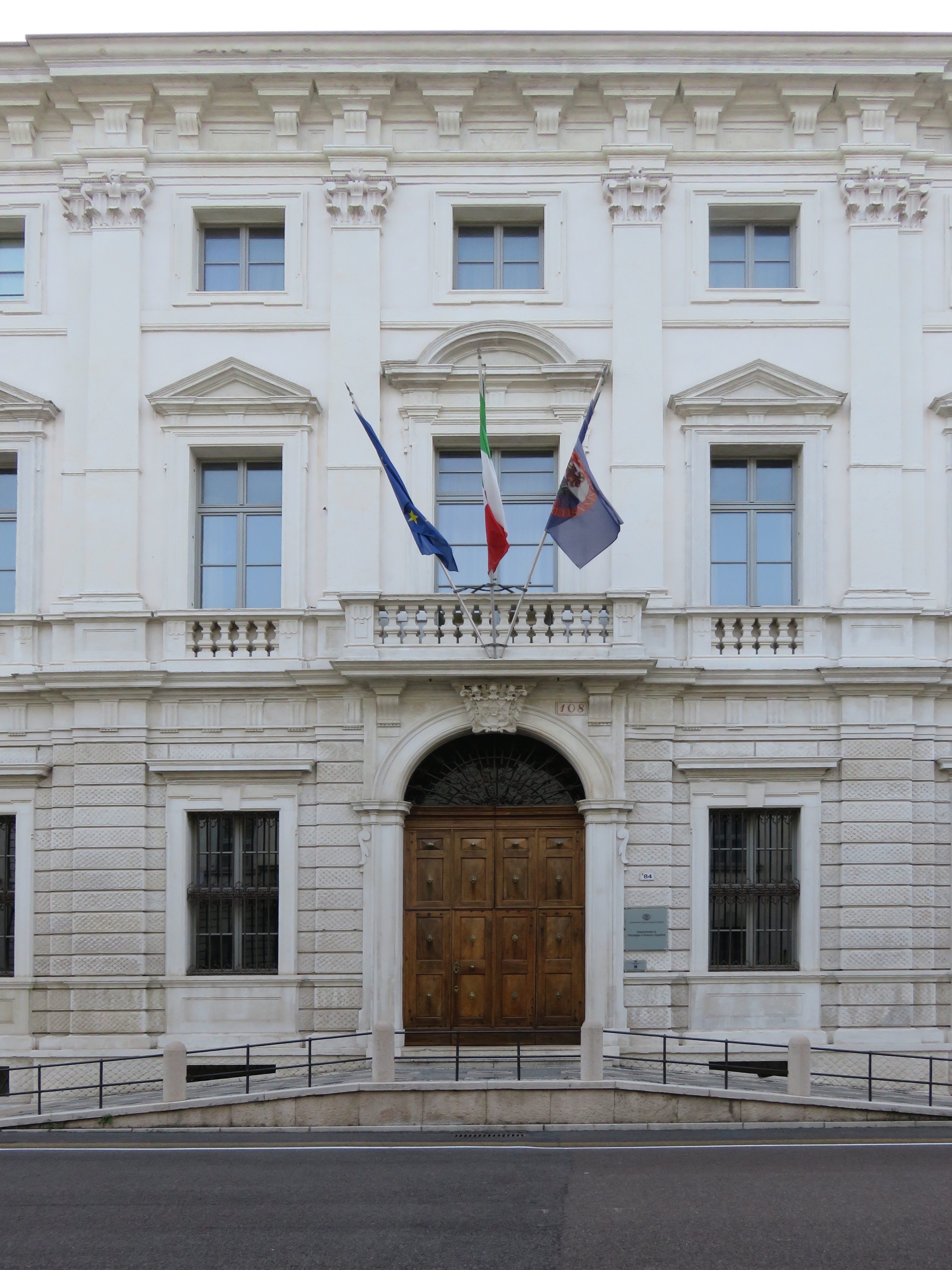 Palazzo Piomarta in Corso Bettini a Rovereto